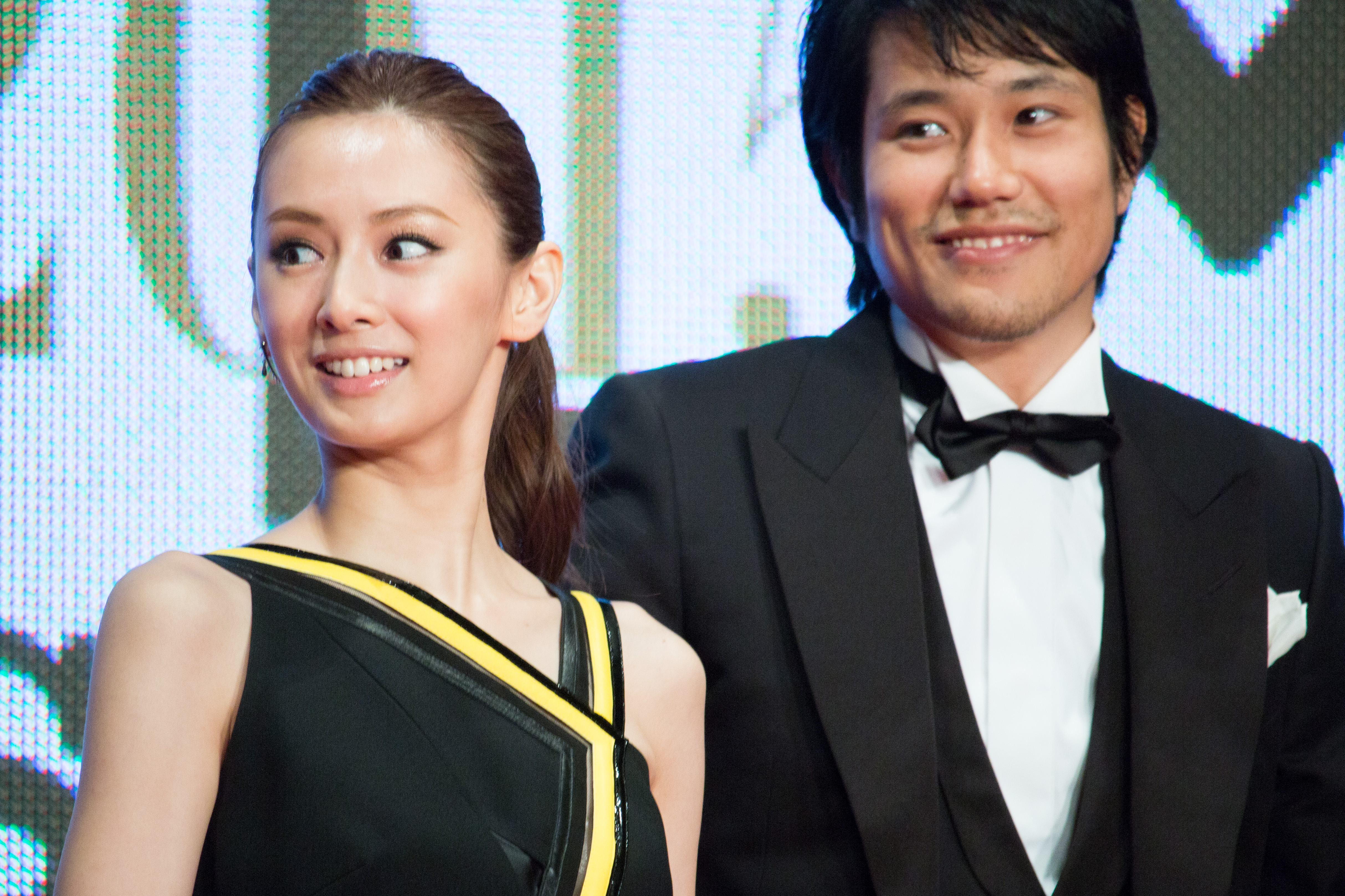 第28回 東京国際映画祭 オープニングセレモニー 北川景子 松山ケンイチ (の・ようなもの のようなもの)